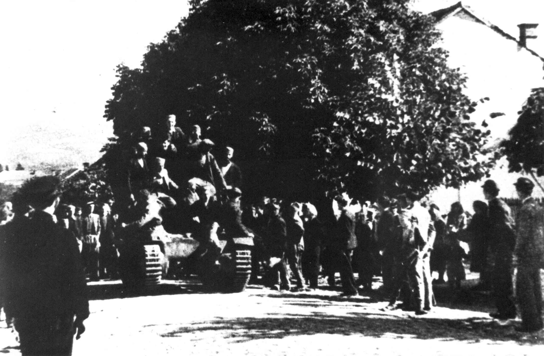 Srpskohrvatski / српскохрватски: Zarobljeni nemački tenk od boraca Takovskog bataljona Čačanskog partizanskog odreda kod Rapaj brda, Čačak 5. oktobra 1941.